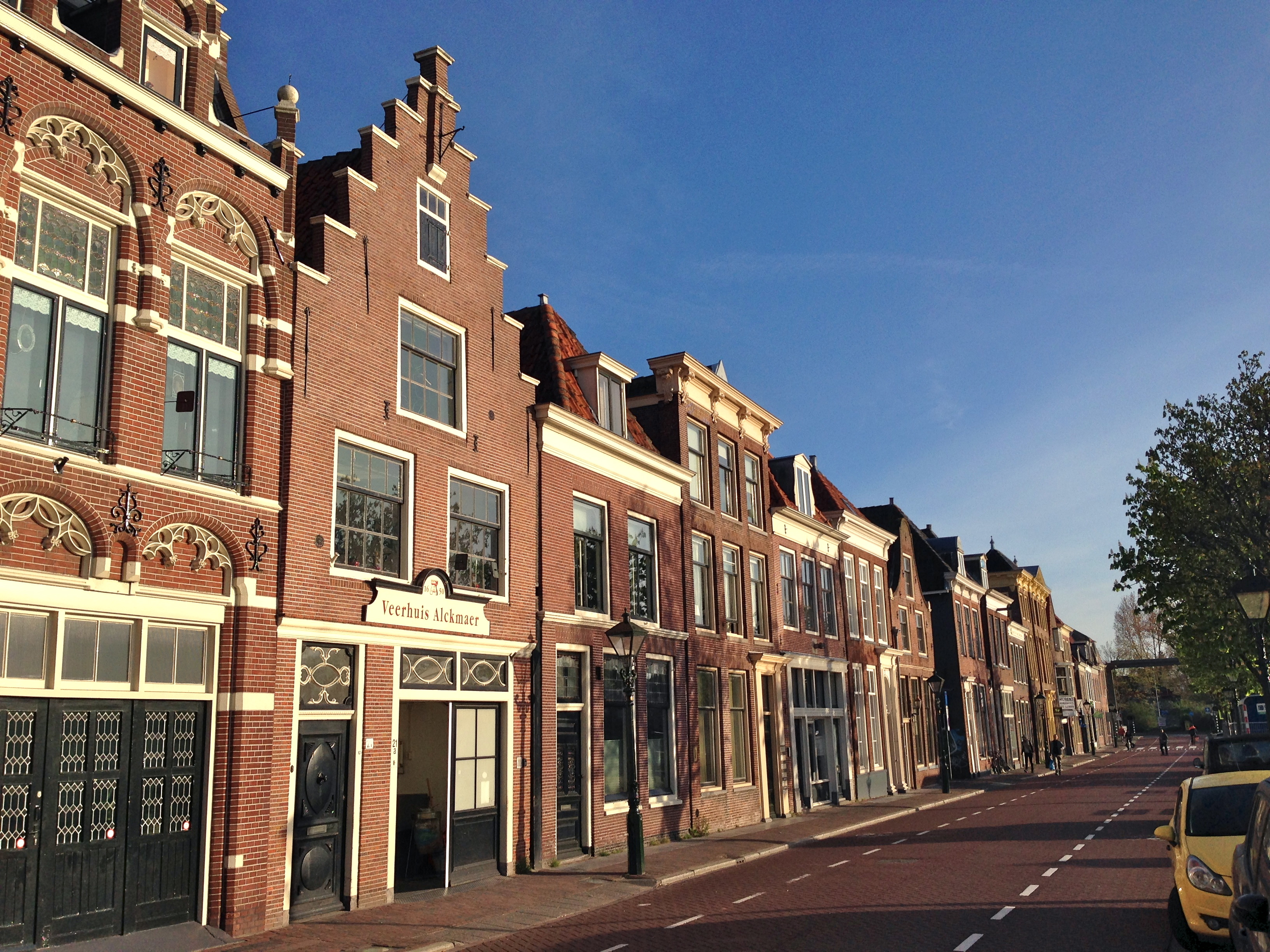 Alkmaar - Bierkade op een zaterdagochtend rond een uur of 8